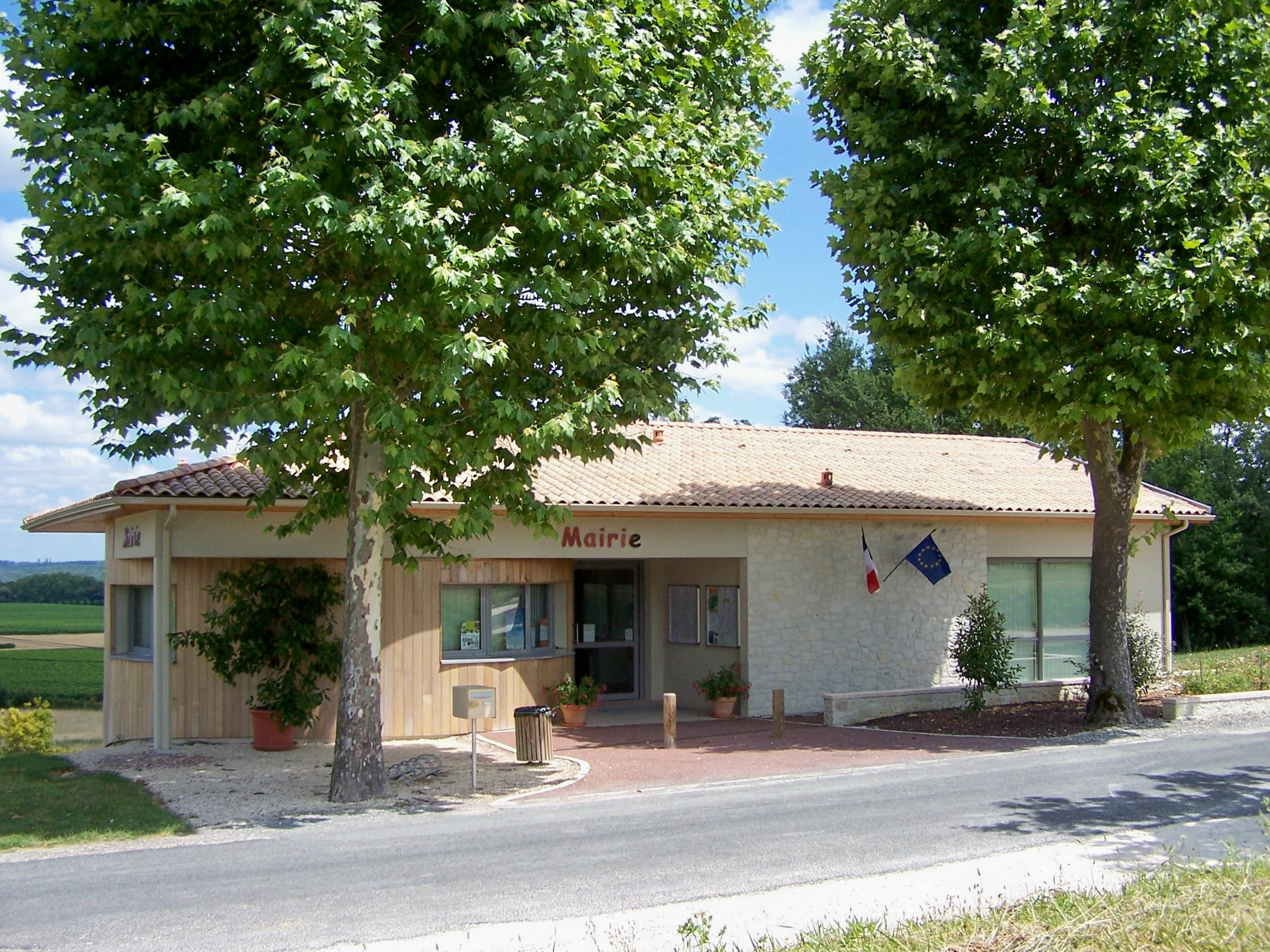 Mairie de Margueron, Gironde, France